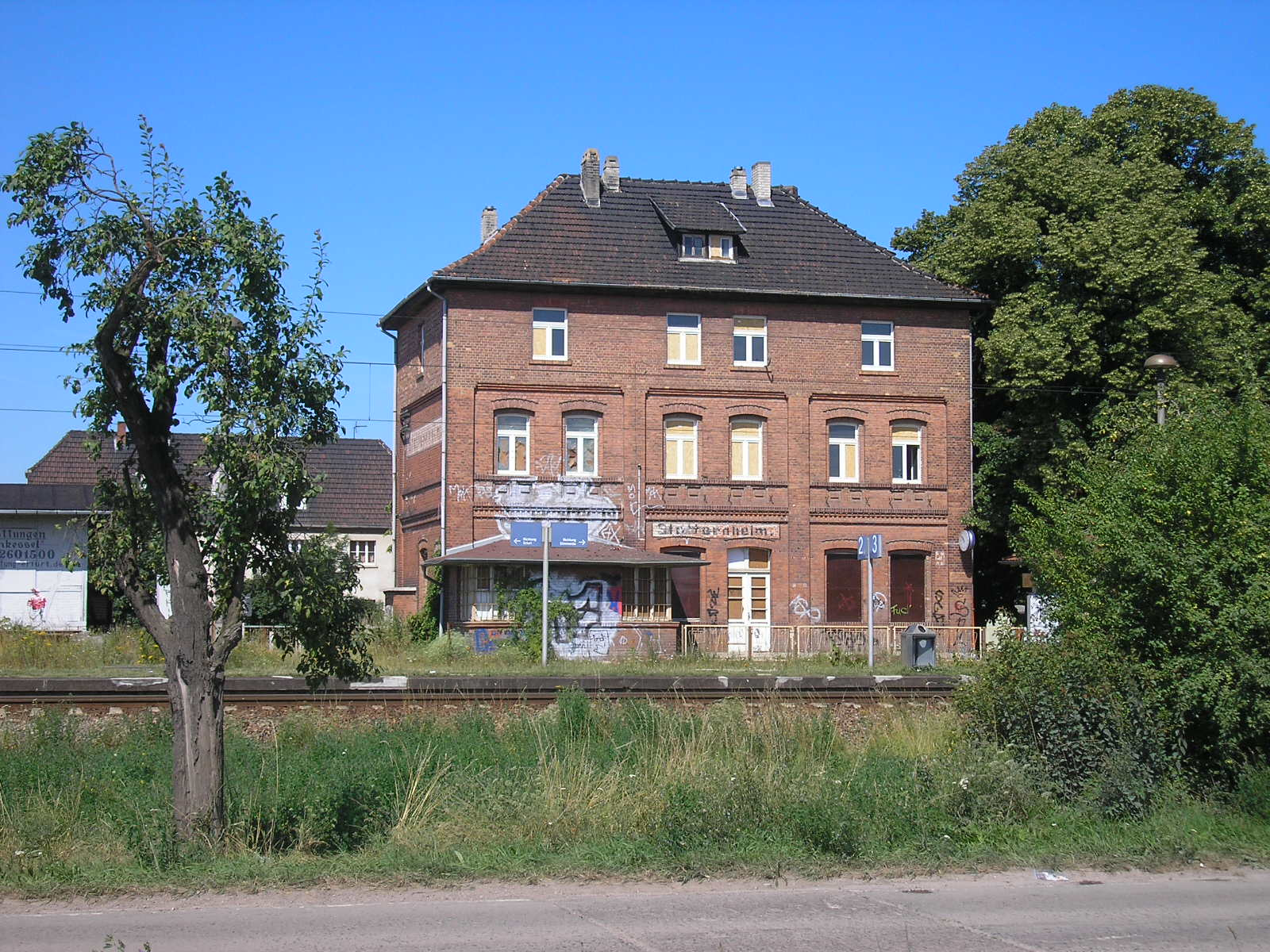 Der Bahnhof von Stotternheim (Thüringen).